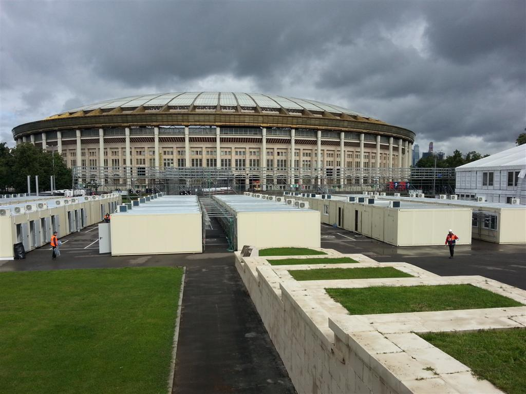 Чемпионат мира по легкой атлетике